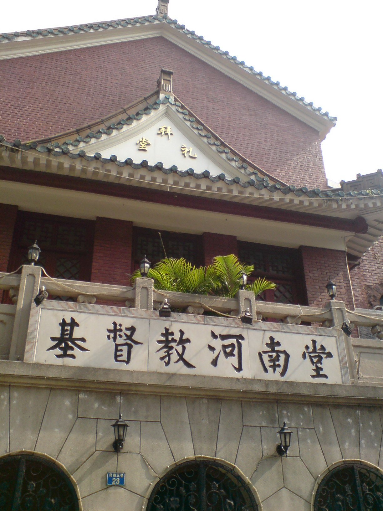 基督教河南堂